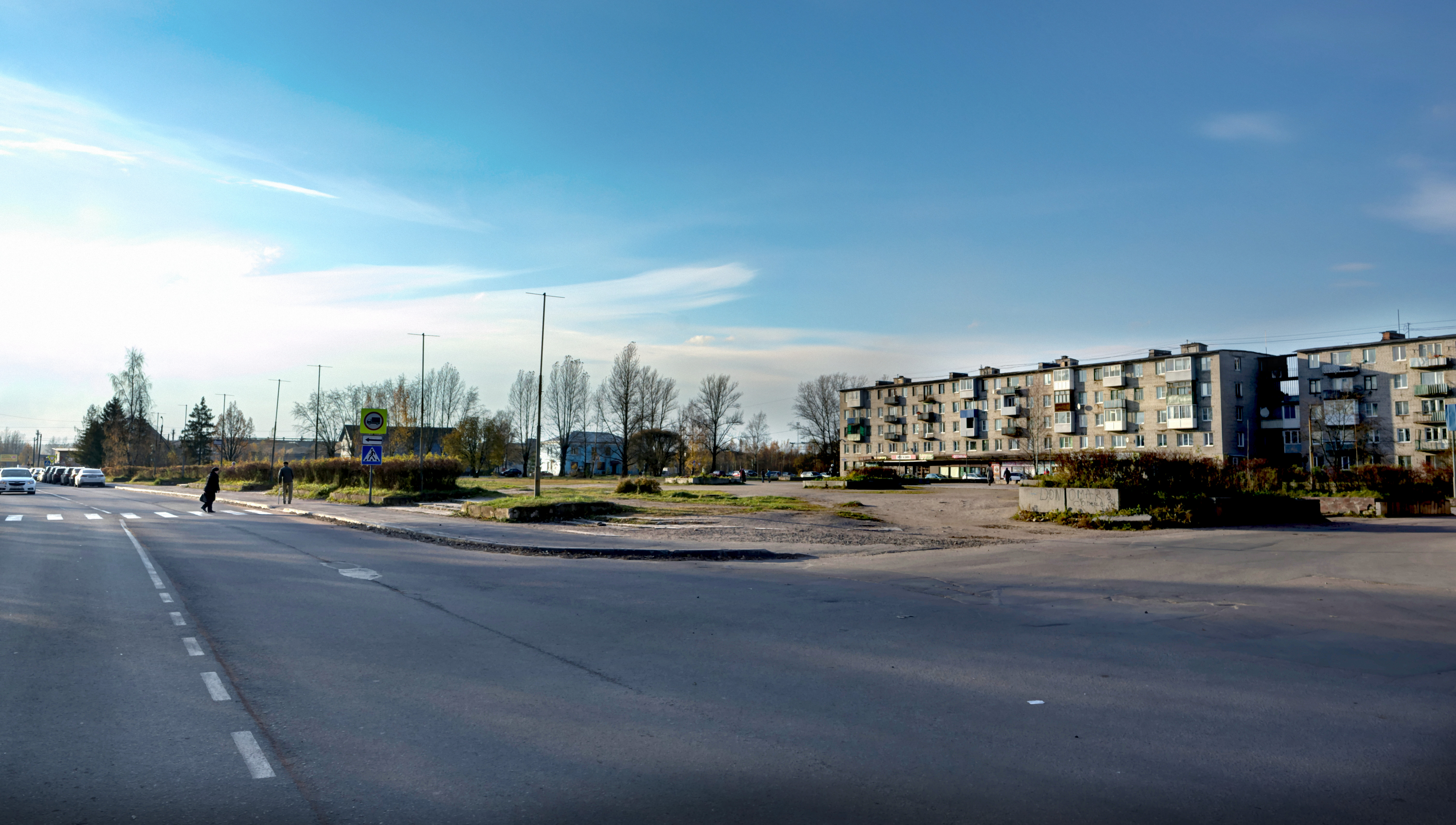 Enso (Svetogorsk) 24.10.2016